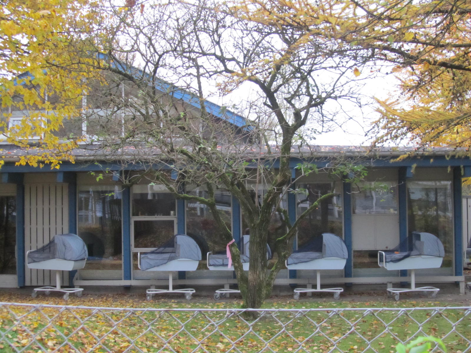 Gellerup (Taani), lastesõim a. 2011